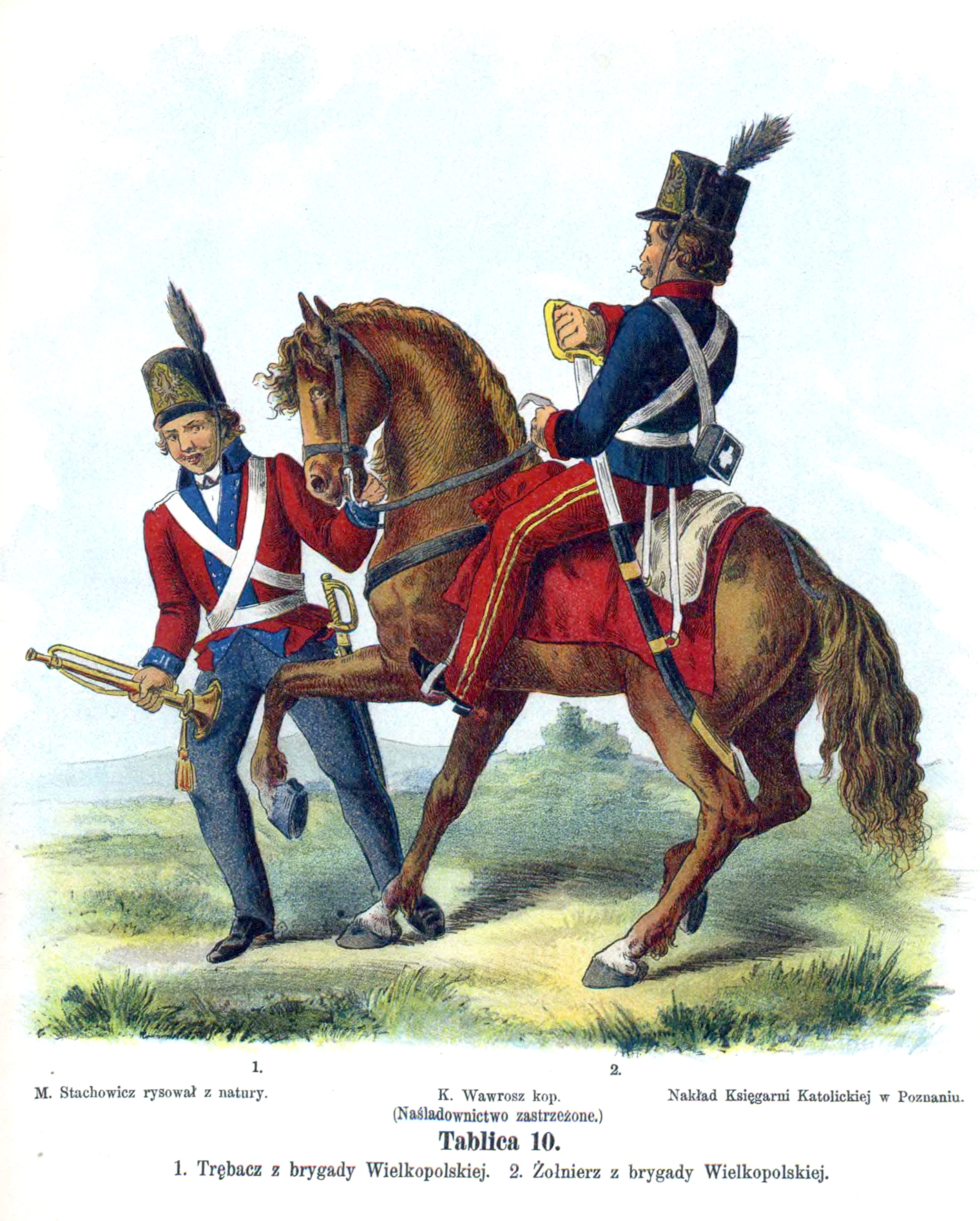 Kościuszko Uprising army